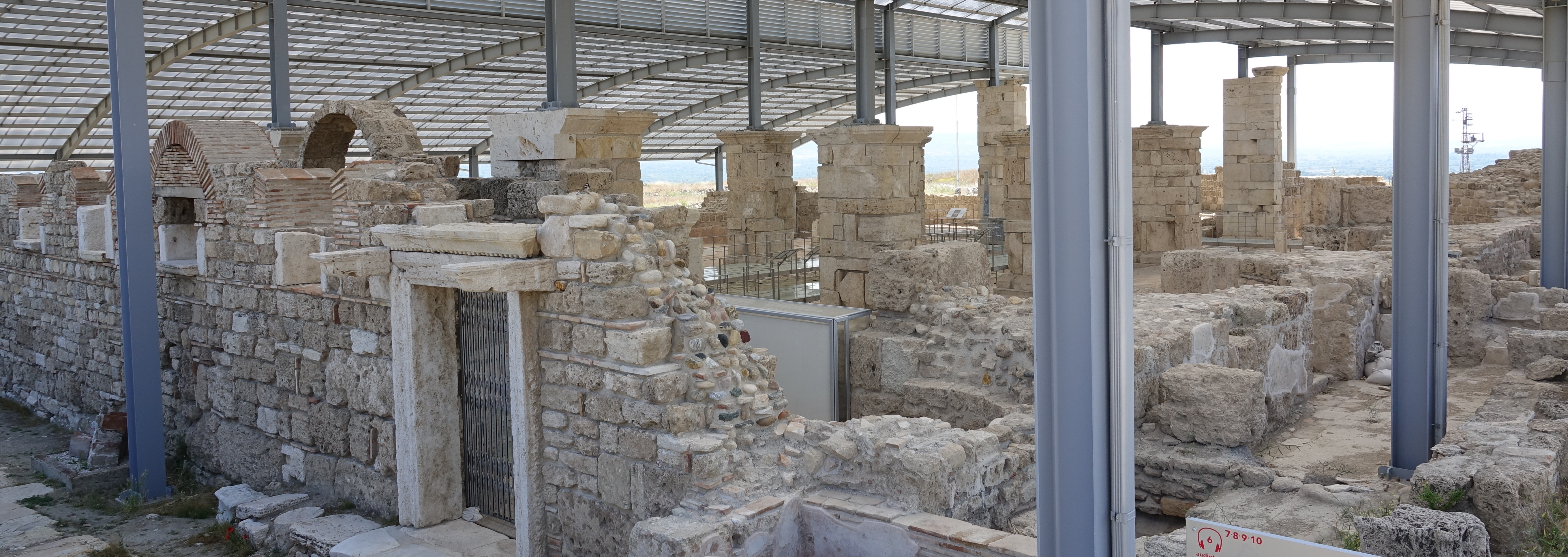 Blick auf die ausgegrabene aber leider auch 2017 immer noch nicht zugängliche Kirche aus dem 4. Jh